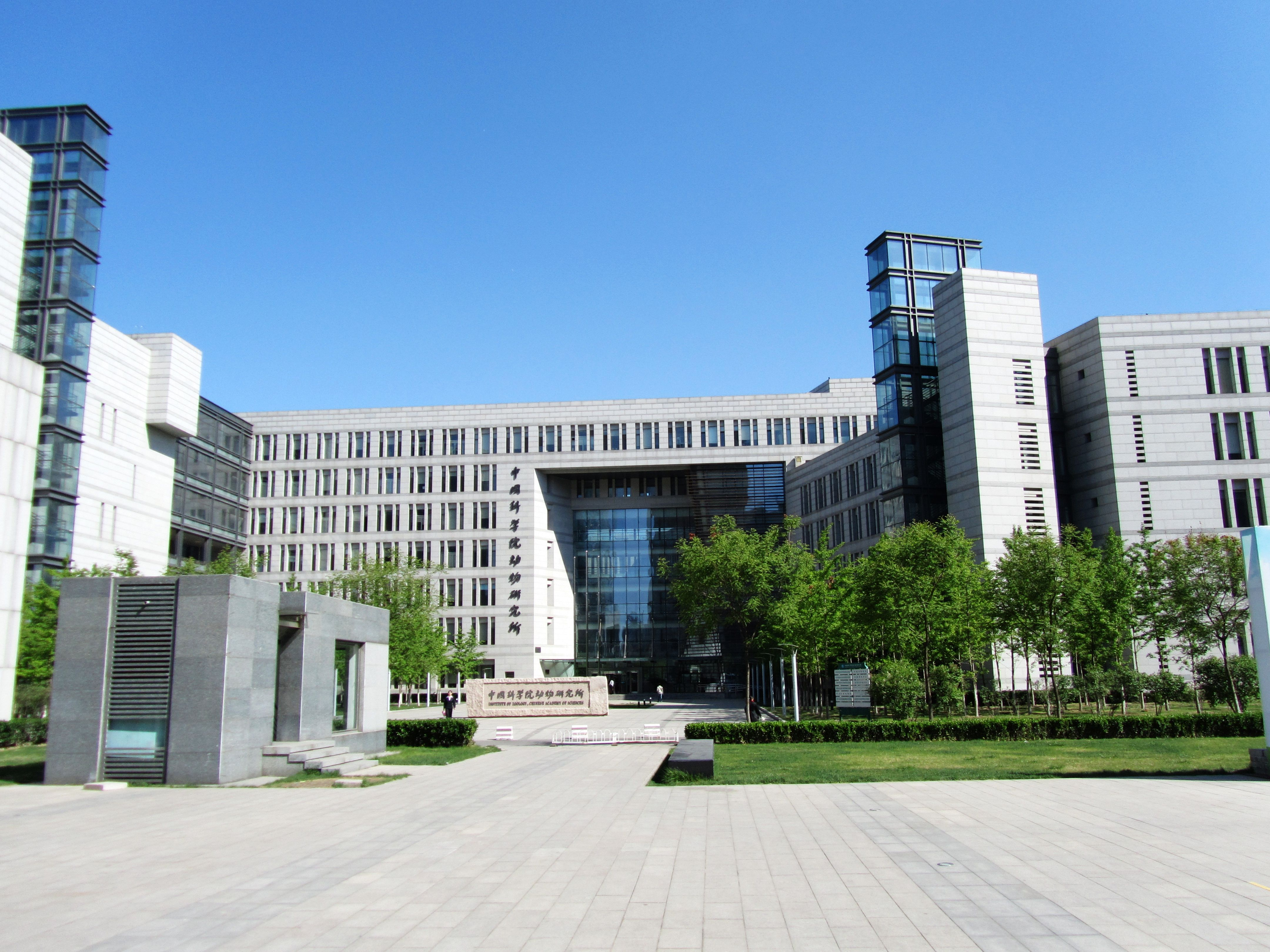 位于朝阳区北辰西路1号院5号的中国科学院动物研究所。